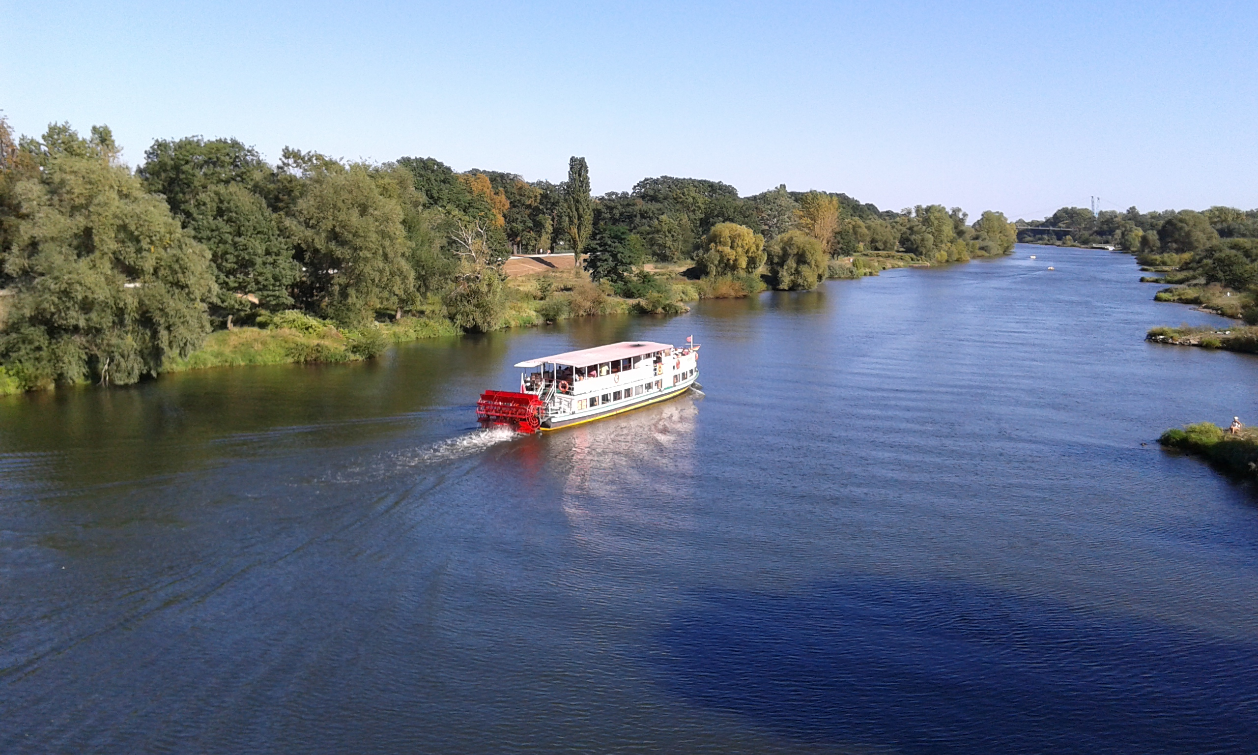 Rakowiec, Wrocław, Poland